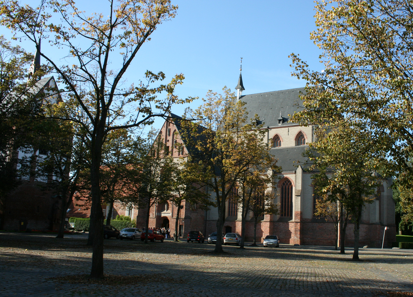 Ludgerikirche auf dem Marktplatz (links der freistehende Glockenturm) im Jahr 2007